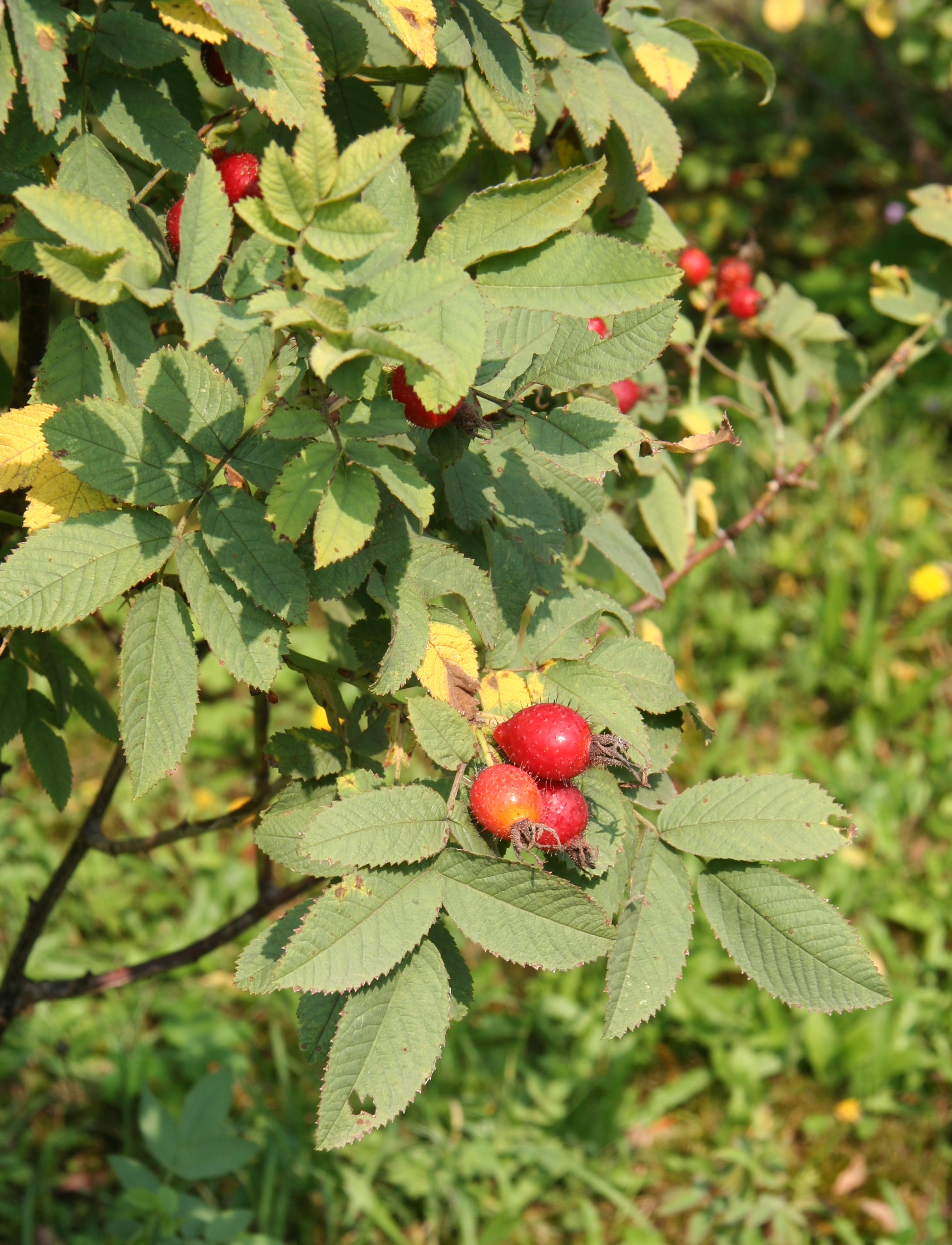 Rosa villosa im Botanischen Garten Dresden